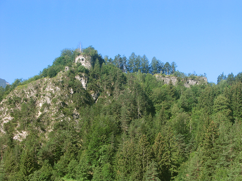 Fort Hensel – Werk B